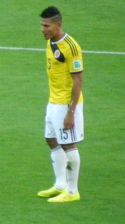 Alexander Mejía, Brasil 2014